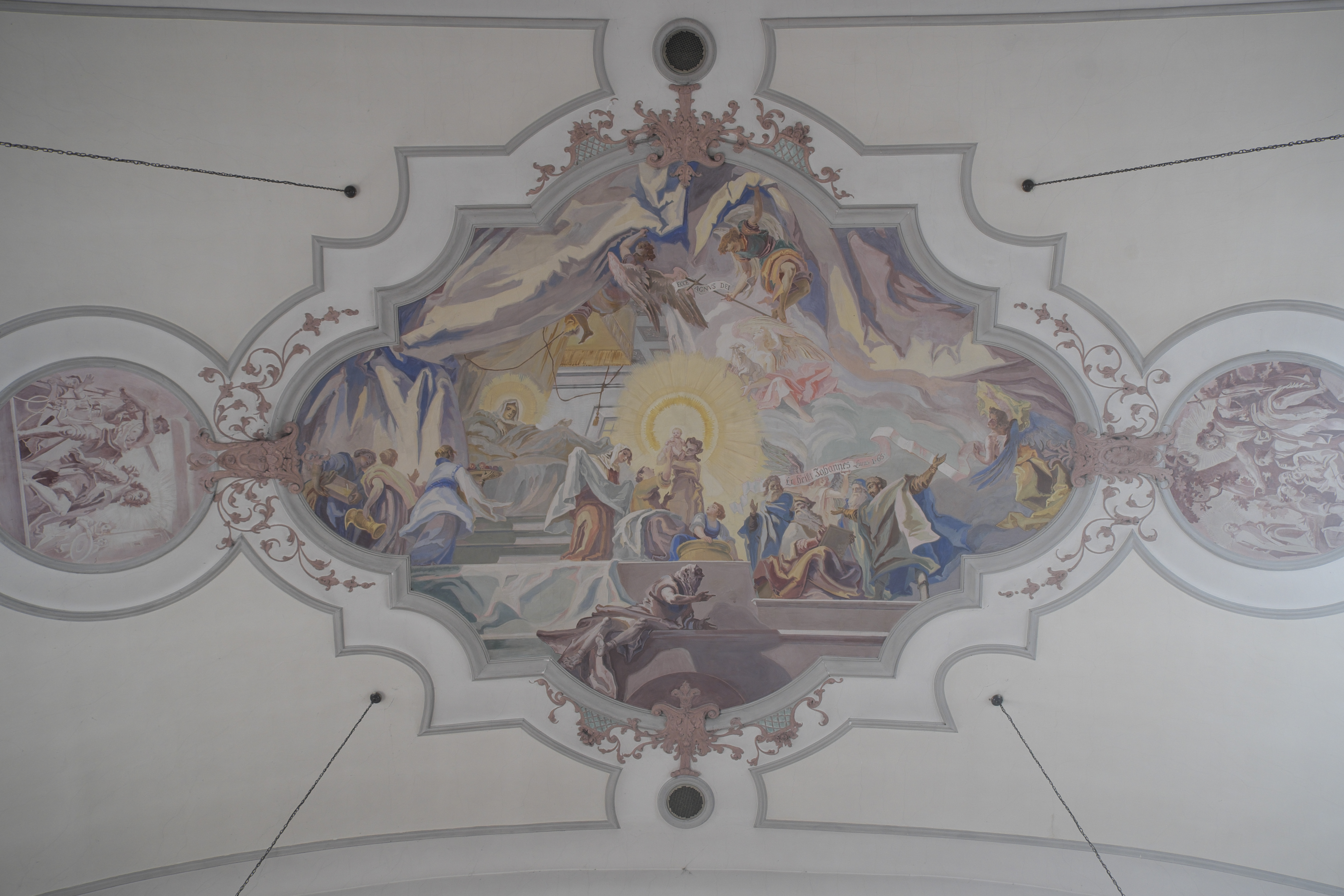 Katholische Pfarrkirche St. Johannes Baptist in Bergkirchen im Landkreis Dachau (Bayern/Deutschland), Deckenmalerei im Langhaus von Richard Holzner, von 1945